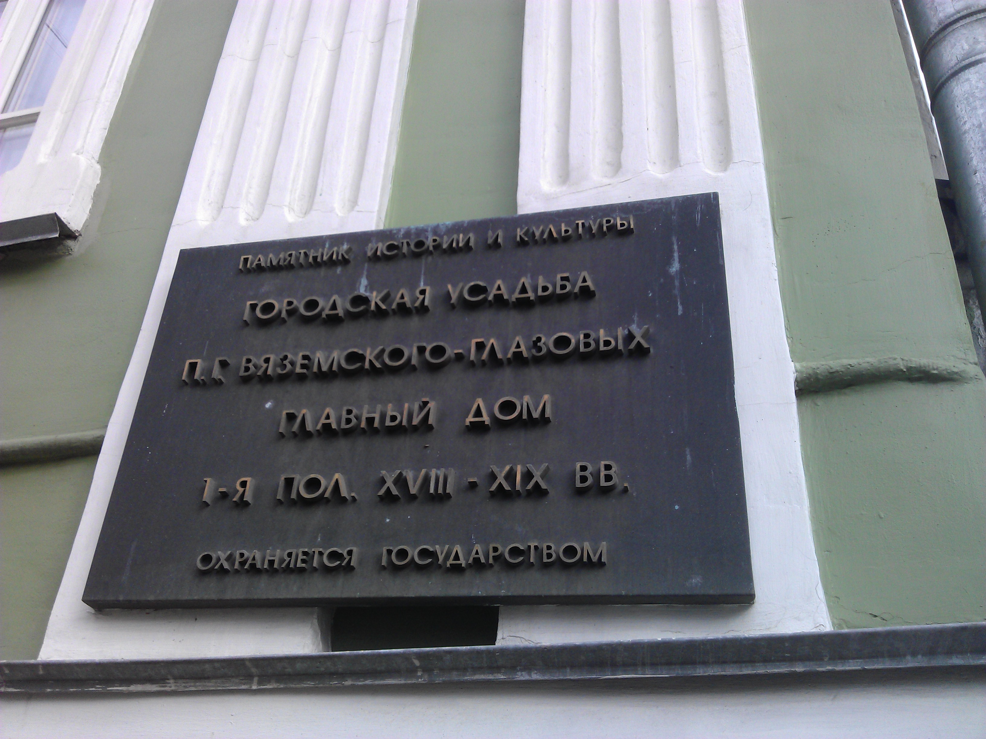 Мемориальная доска на памятнике архитектуры - городской усадьбе П.Г. Вяземского-Глазовых в Спасоналивковском переулке (Москва).